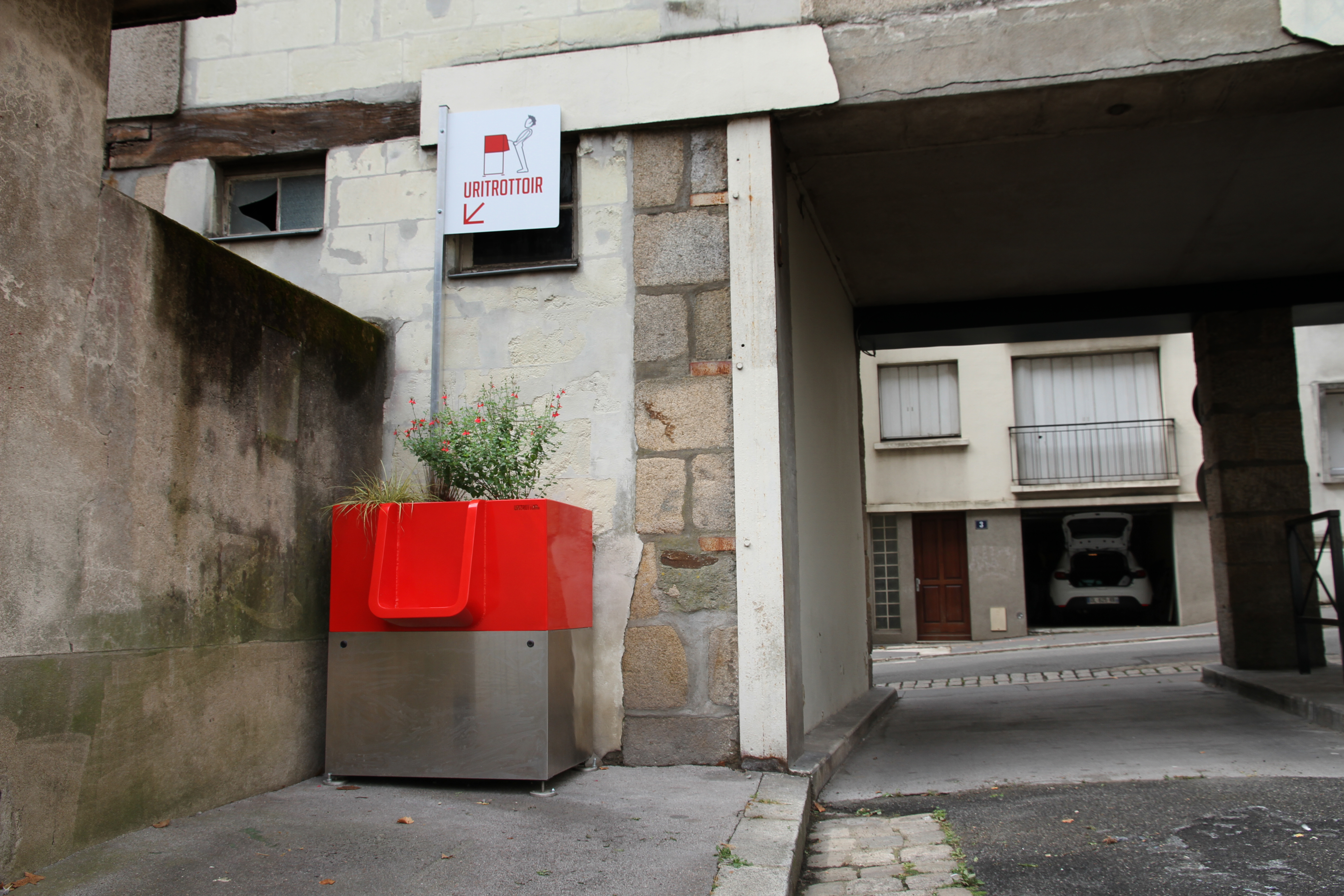 Uritrottoir STOUT rue Montaudouine à Nantes